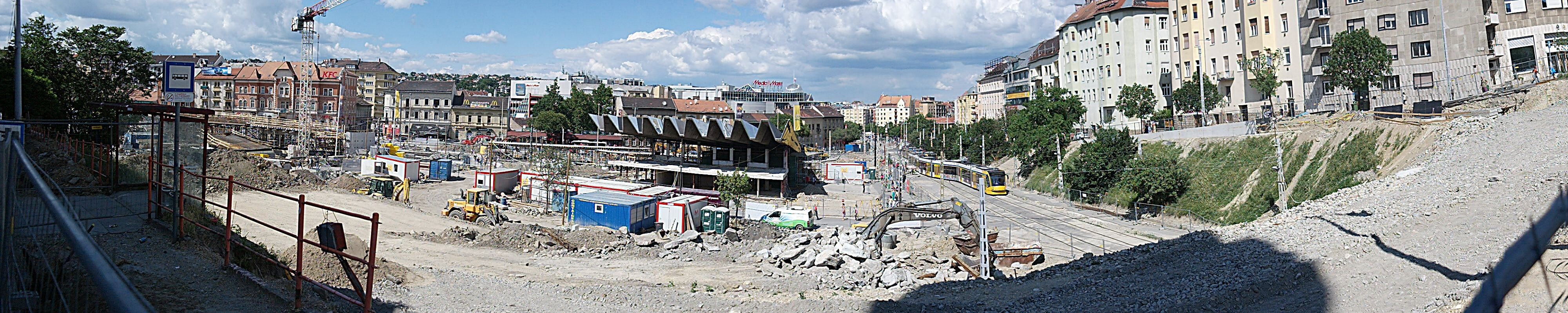 A budapesti Széll Kálmán tér átépítése 2015-ben